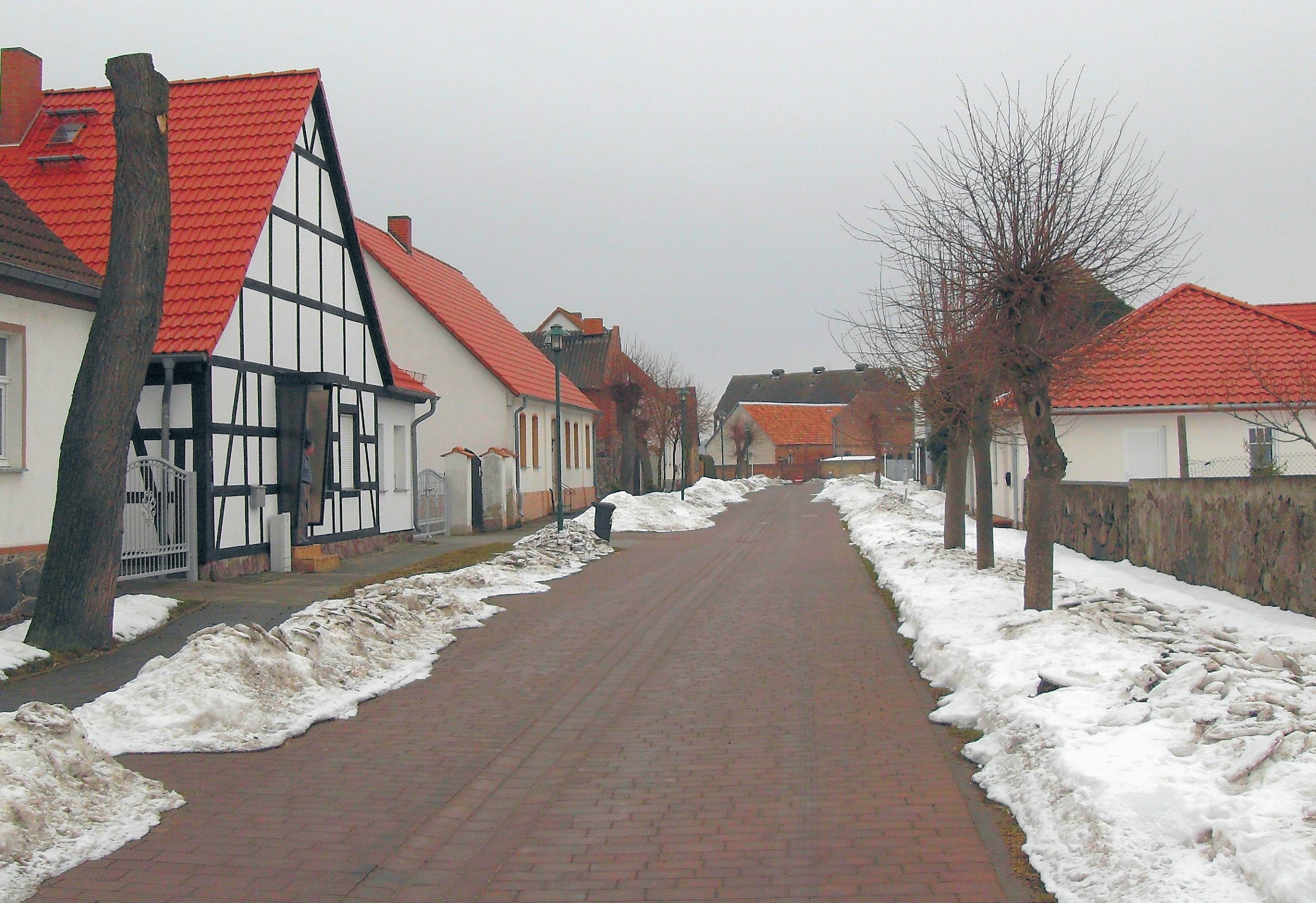 Lindenstraße in Blumenhagen, Stadt Schwedt/Oder, Deutschland